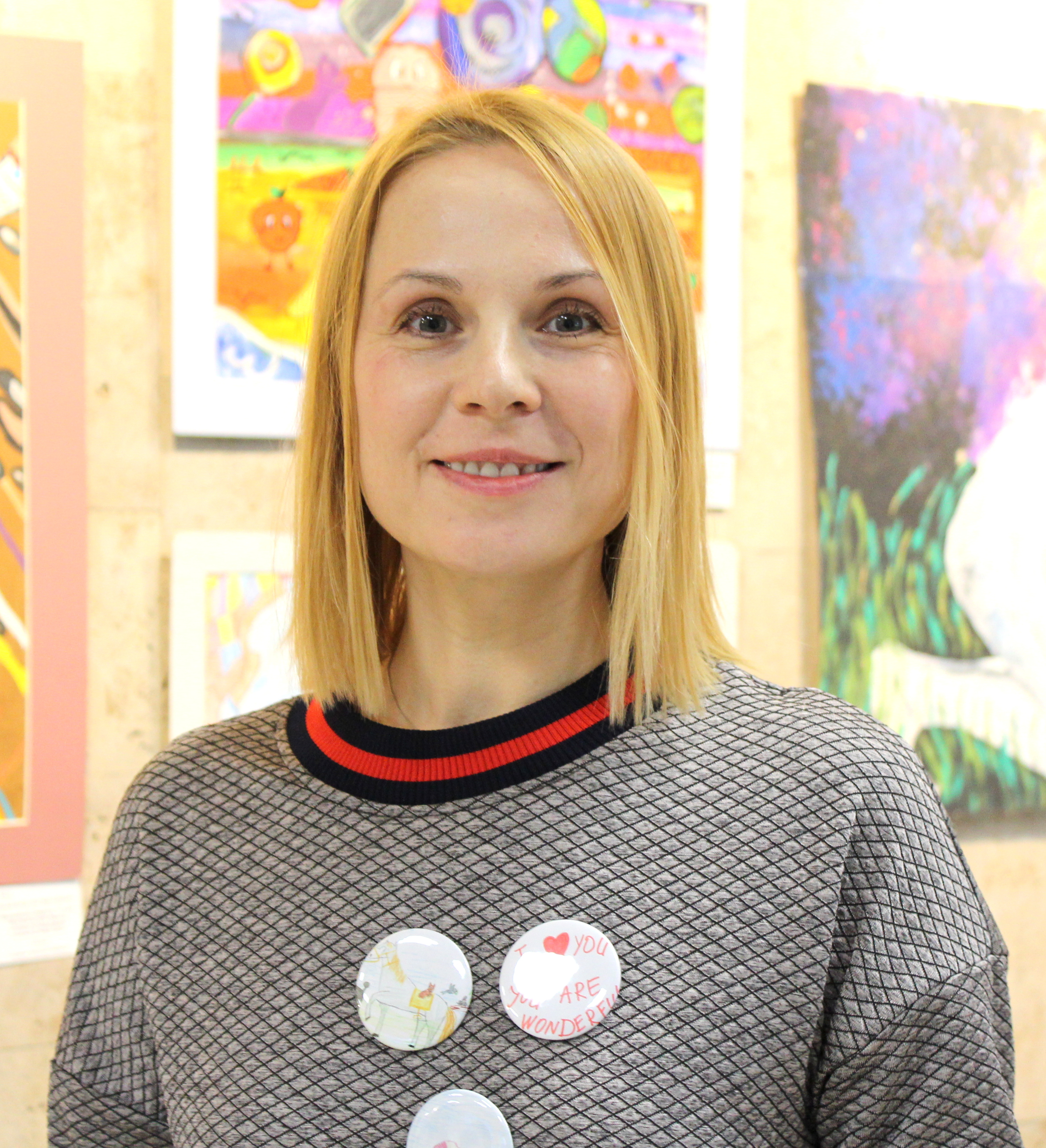 Дина Корзун (Дианна Александровна Корзун-Франк)- актриса, соучредитель фонда «Подари жизнь».